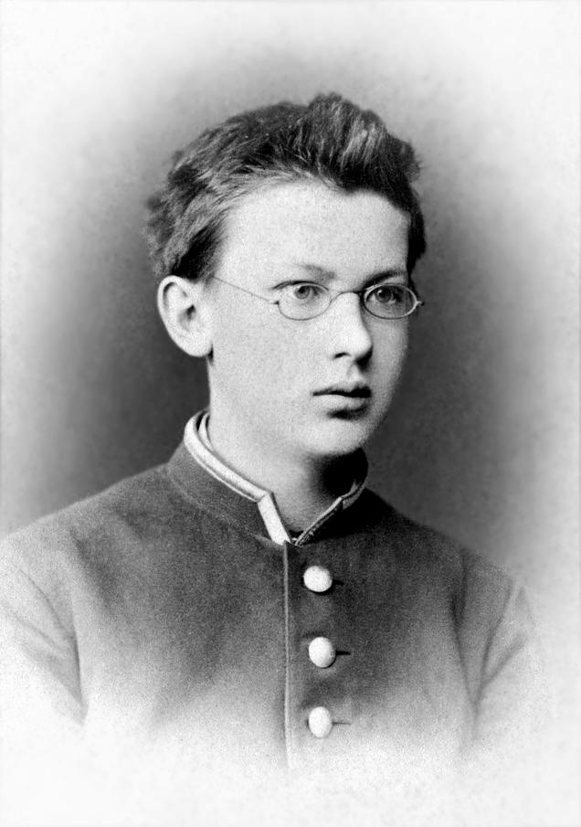 Владимир Вернадский, гимназист 1-й классической гимназии Петербурга. Фото 1878 г.